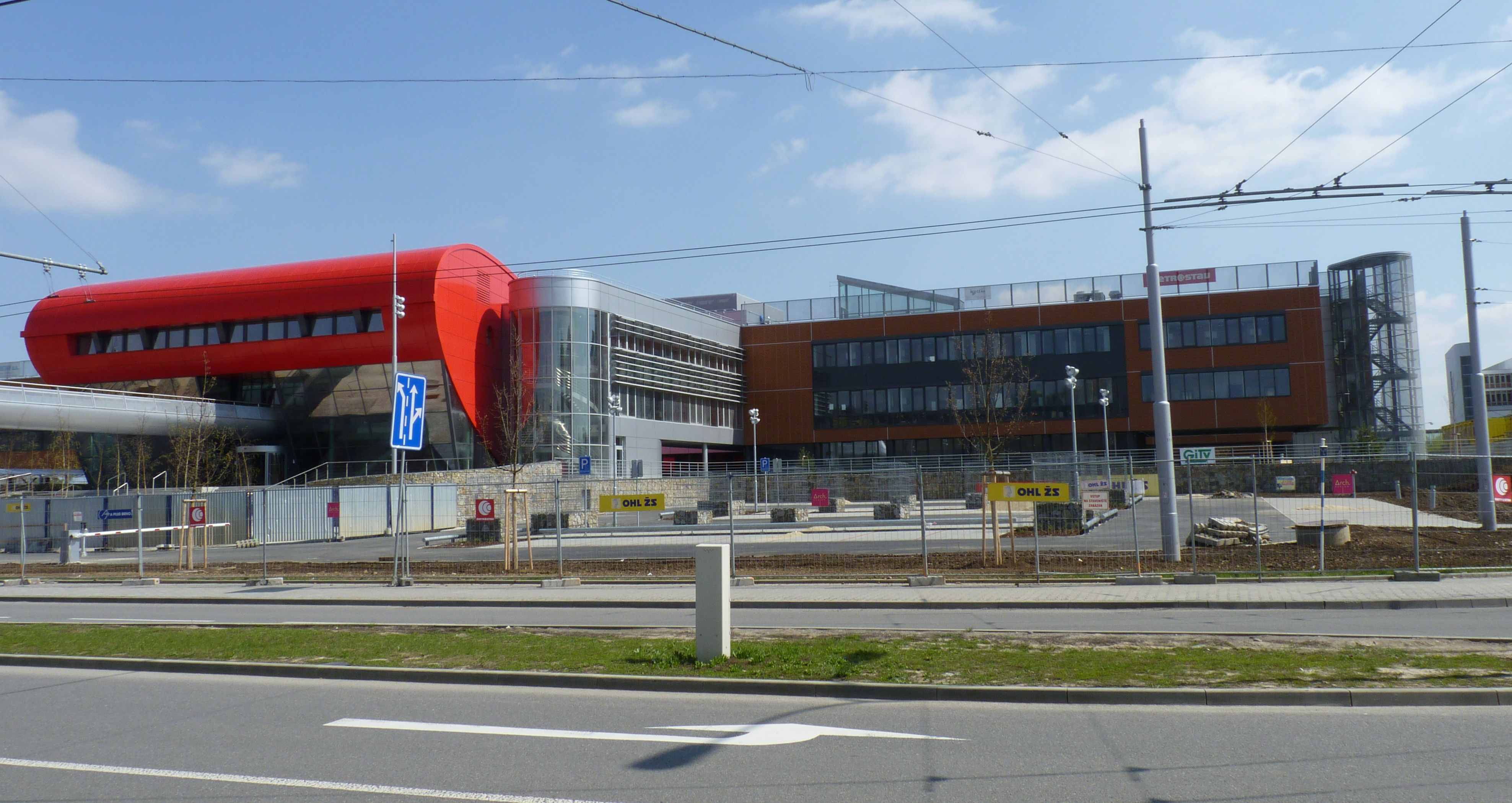 Nový kampus v Bohunicích, Brno